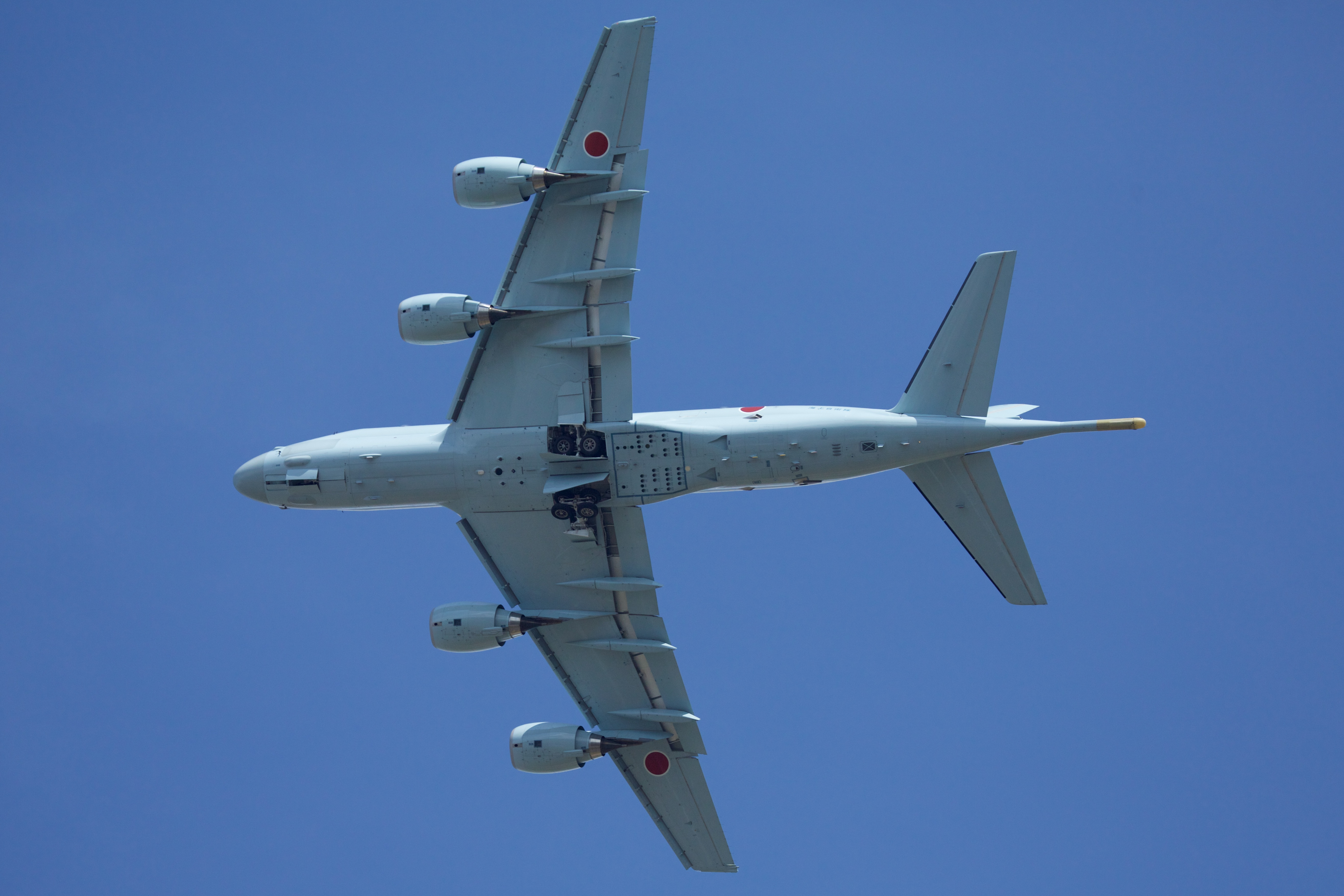 Kawasaki P-1